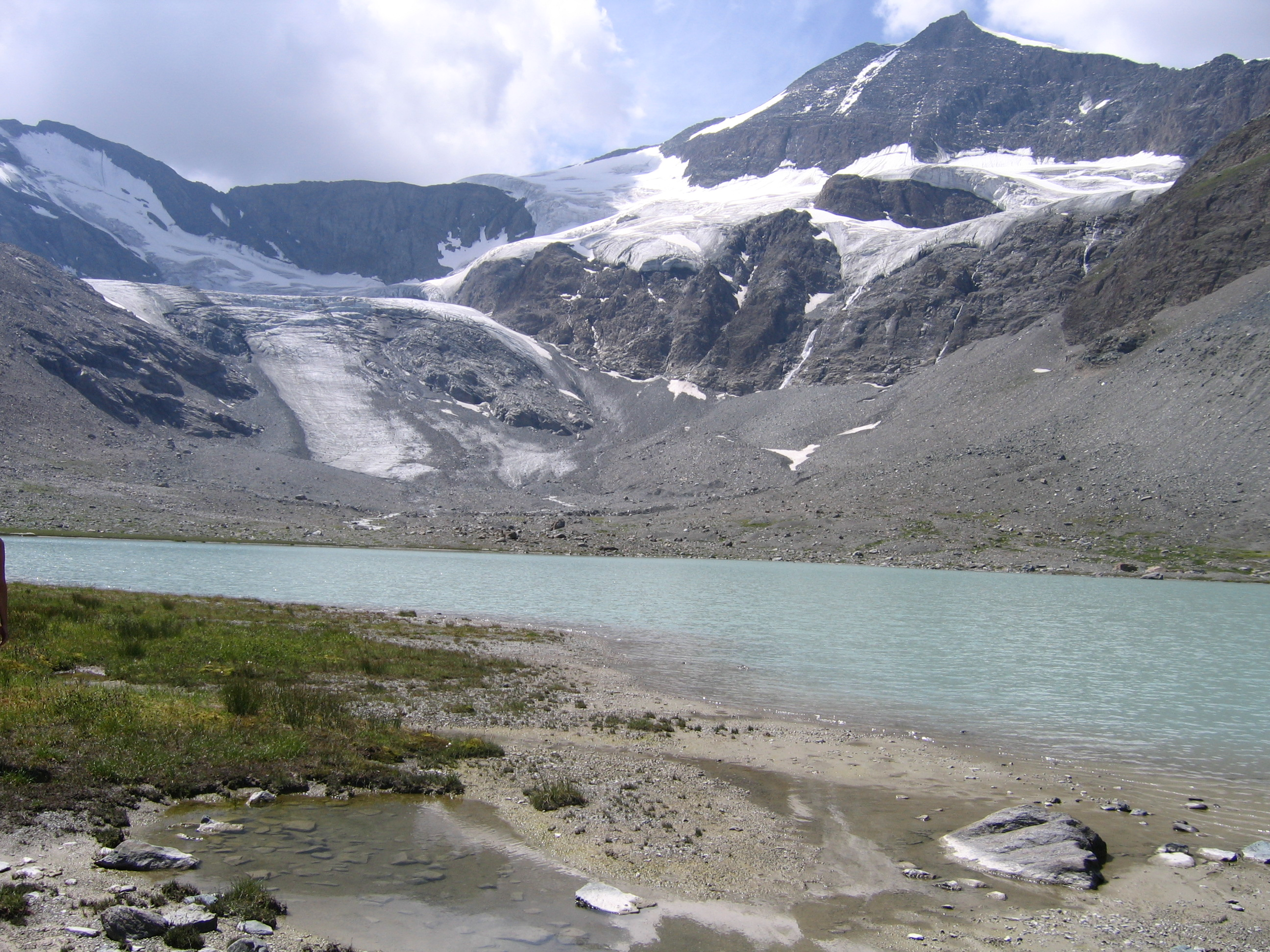 Lac des Evettes, Glacier des Évettes, L'Abaron 3637m